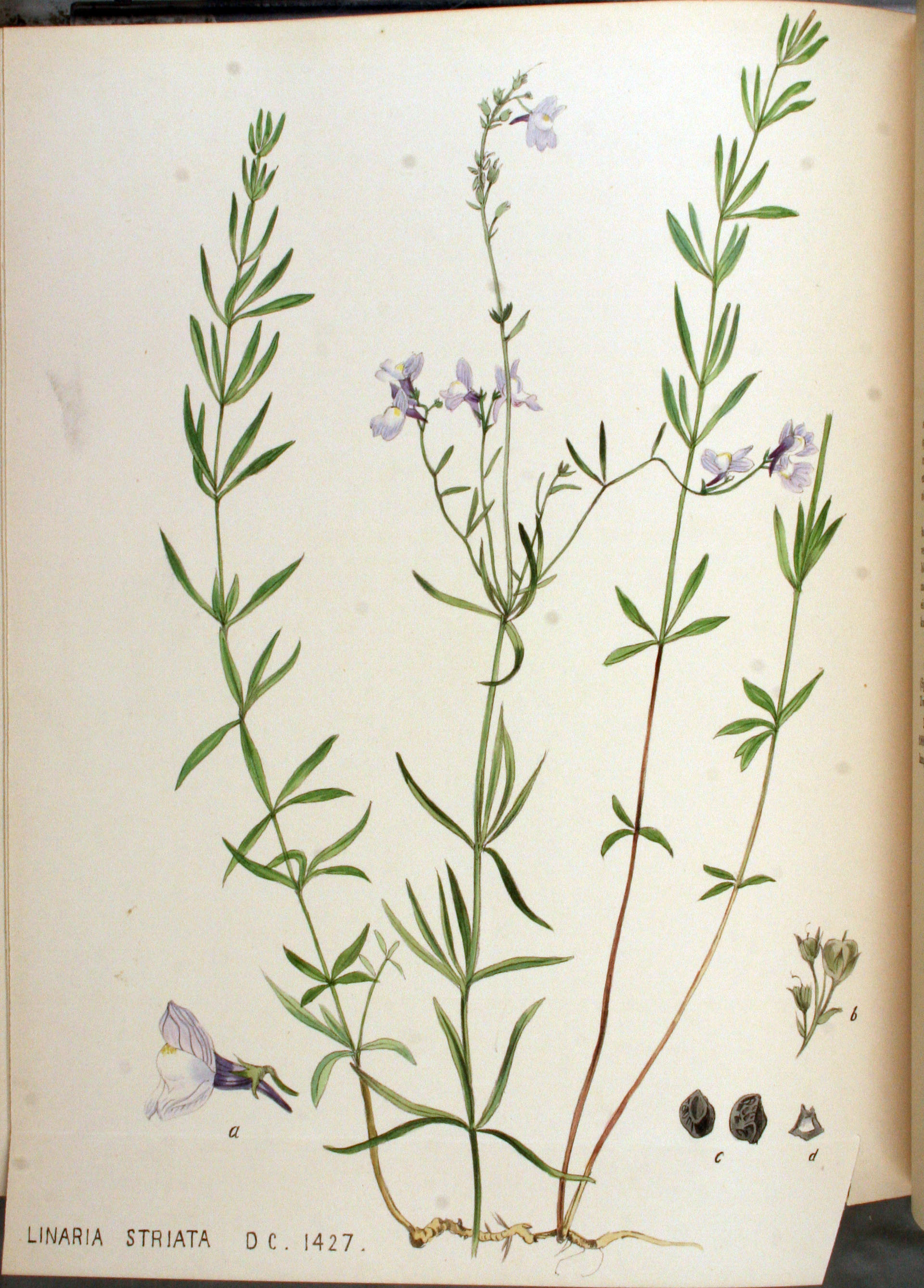 Linaria repens (L.) Mill. (Syn. Linaria striata (Lam.) DC.